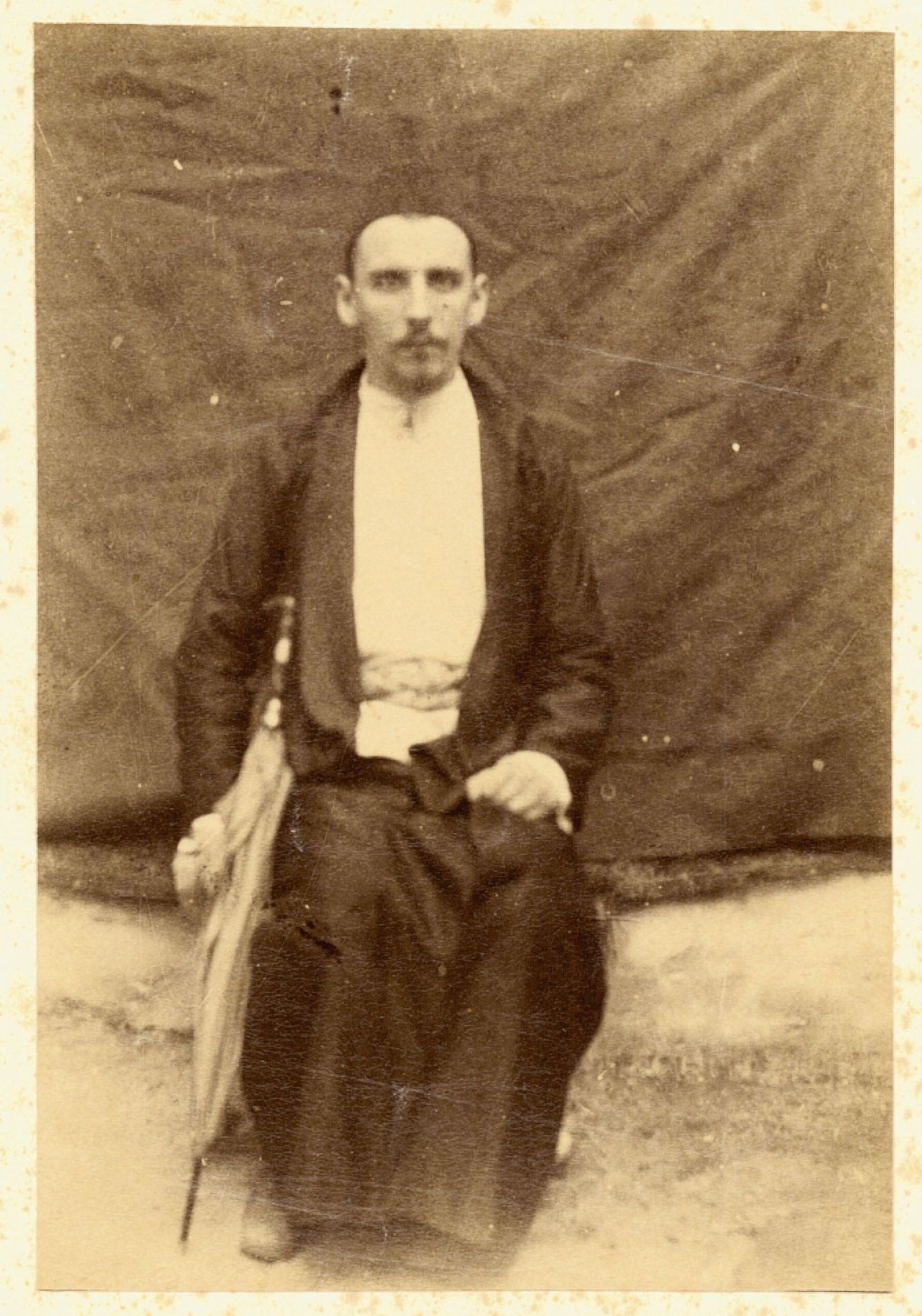 Christiaan Snouck Hurgronje (1857-1936) in Mekka, 1885